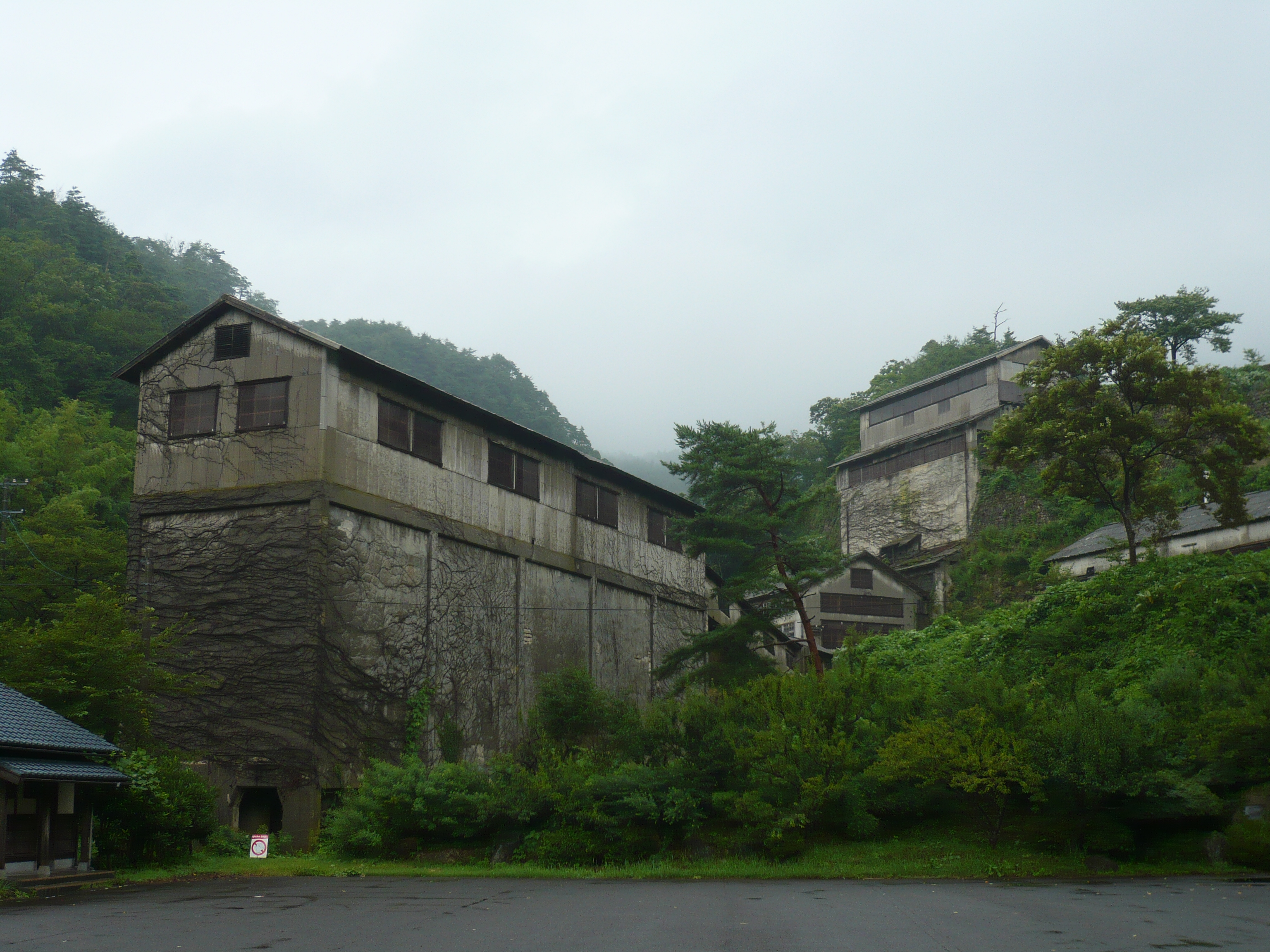 佐渡金山・貯鉱舎